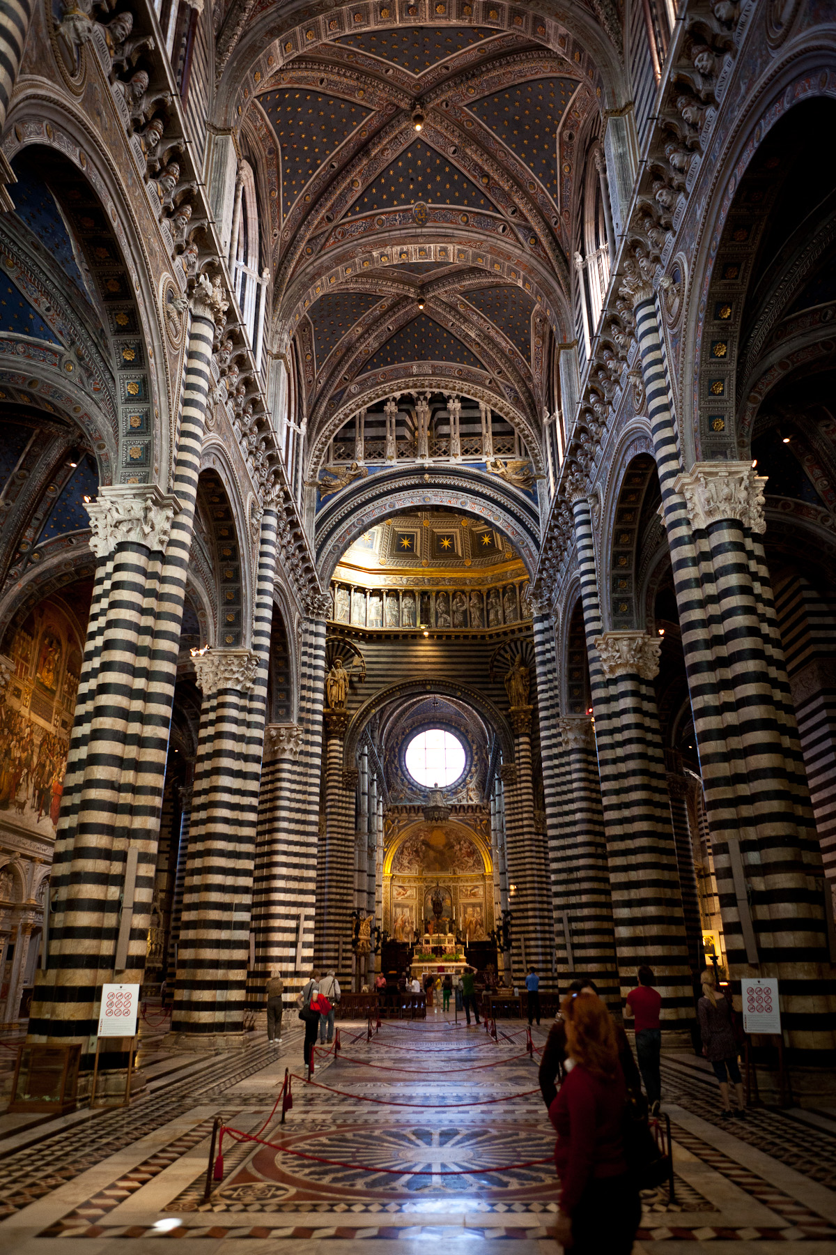 Sienna